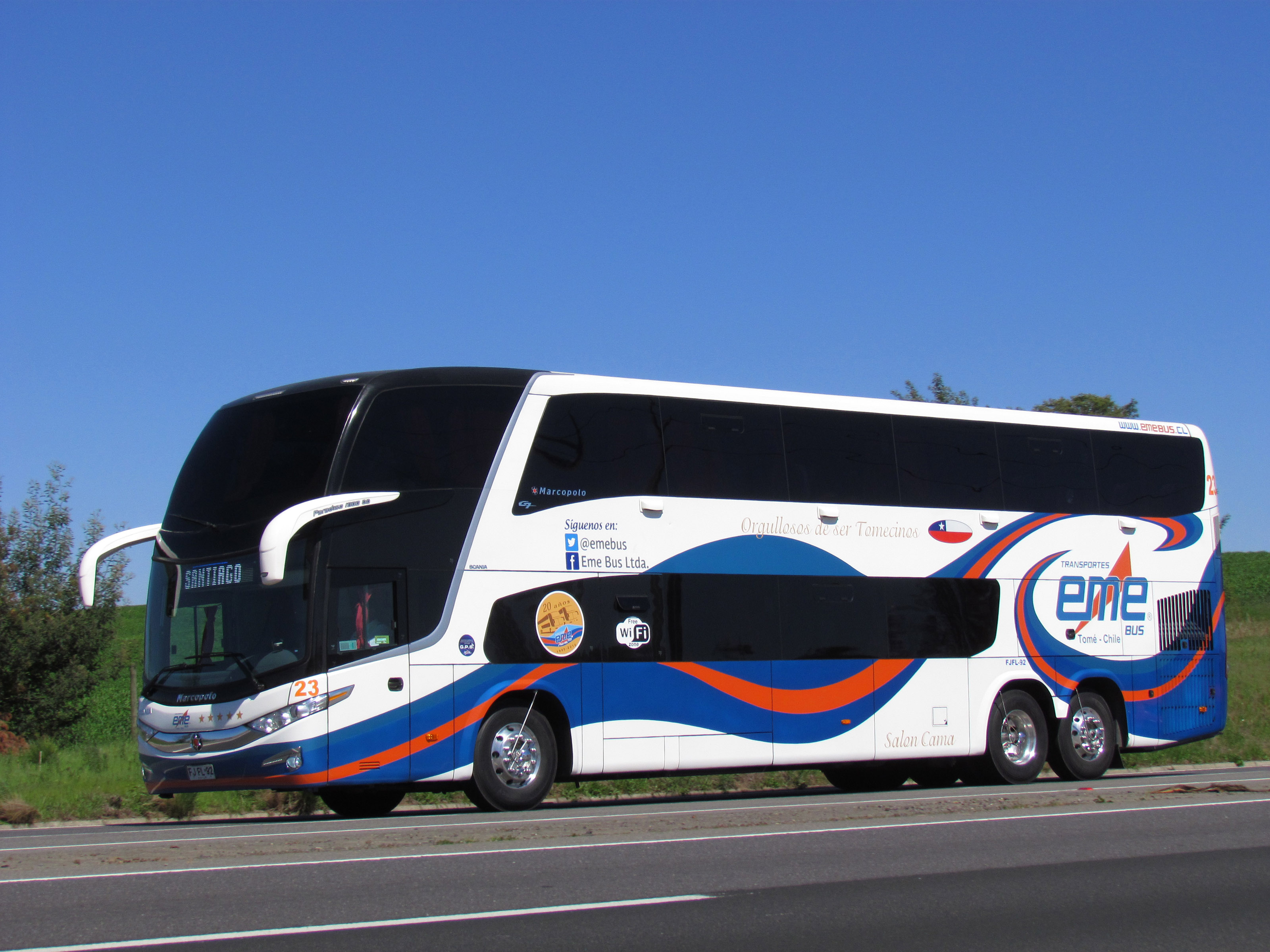 Double Decker